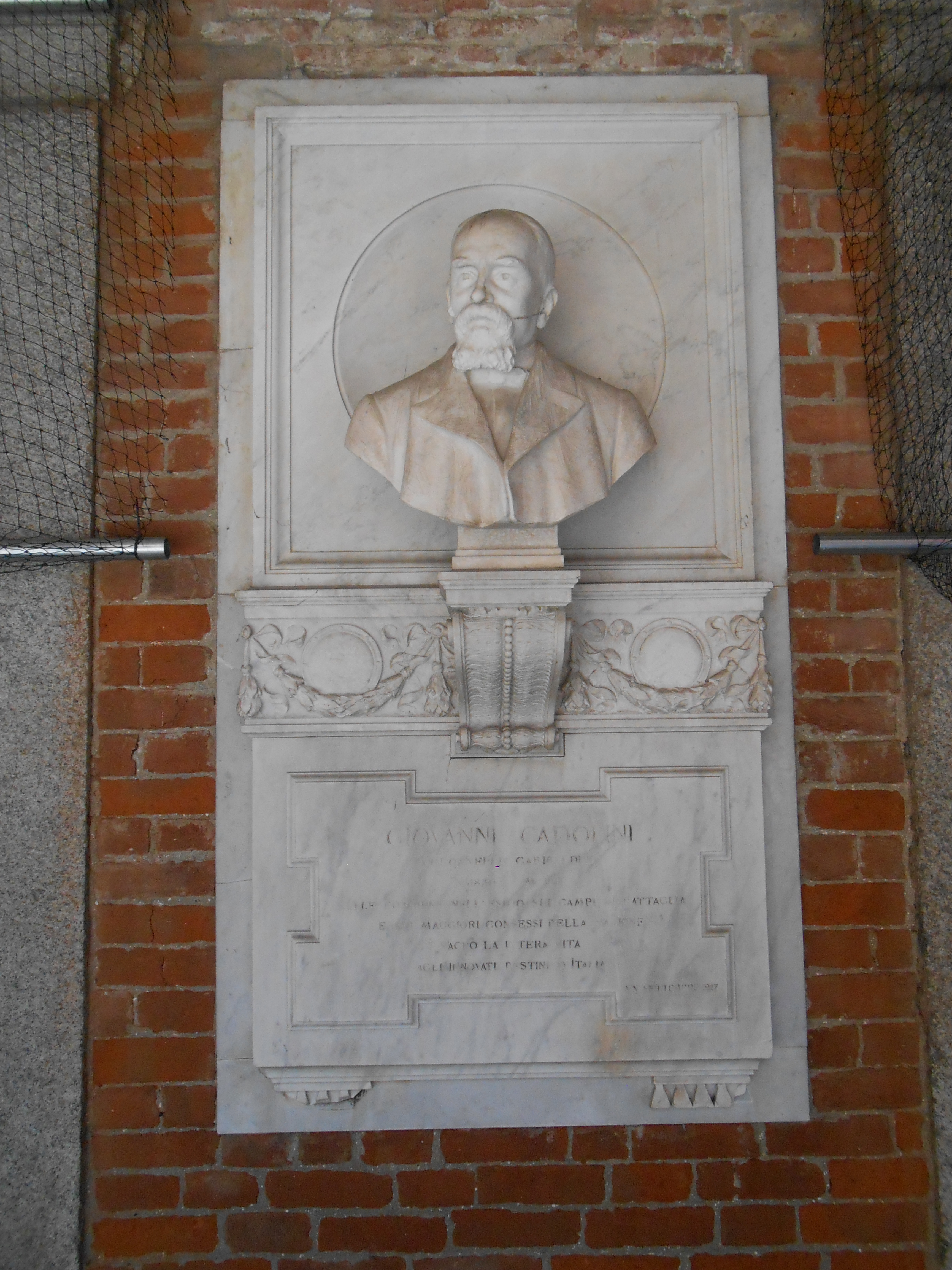 lapide con busto a Giovanni Cadolini presso il municipio di Cremona